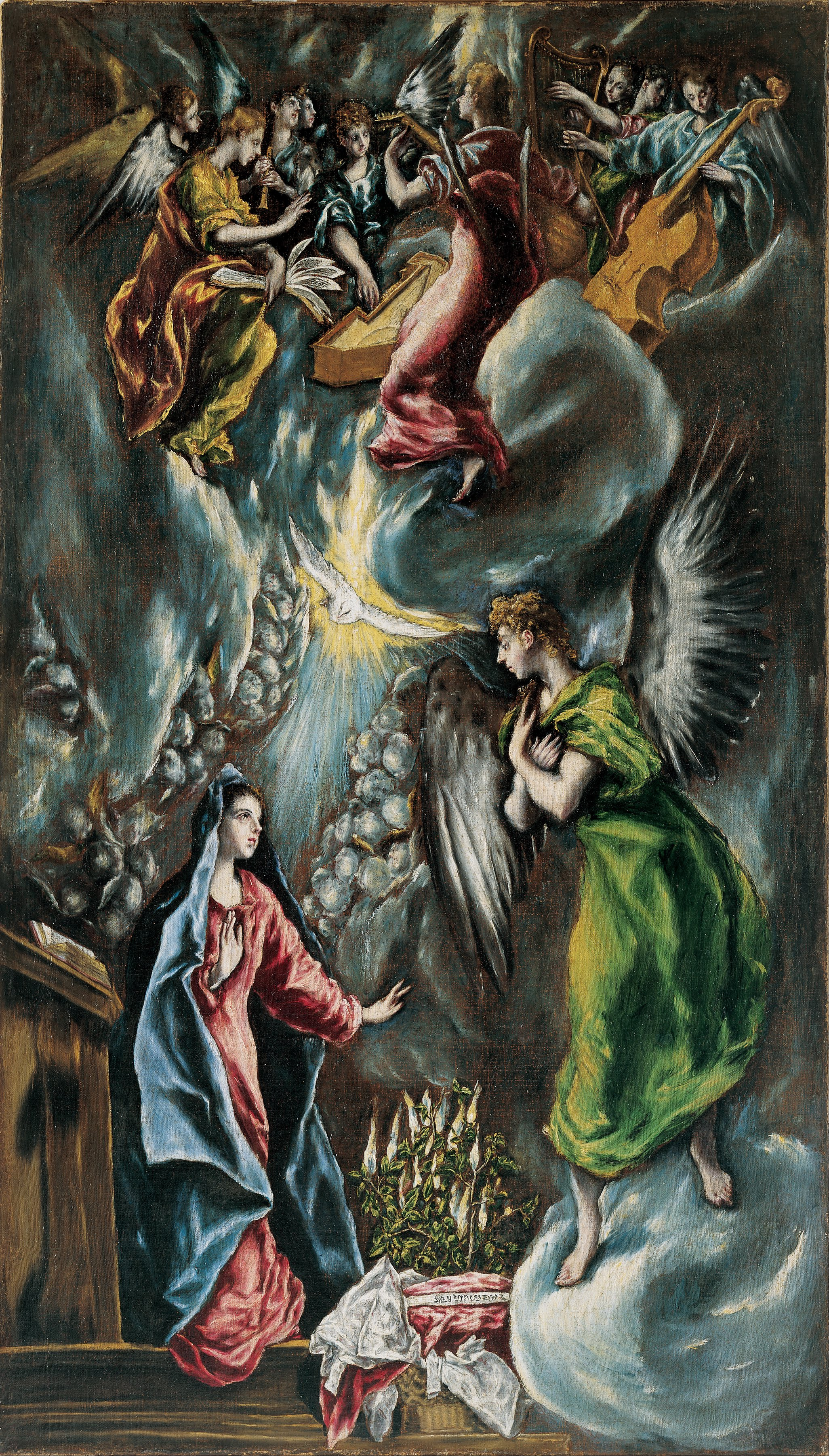 El lienzo representa el momento en que el arcángel San Gabriel anunció a la Virgen María que sería la madre del Salvador, Jesucristo. Esta obra es una replica, aunque de menores dimensiones, de la Anunciación pintada por El Greco que se conserva en el Museo del Prado y que casi con toda seguridad formó parte del retablo de doña María de Aragón.